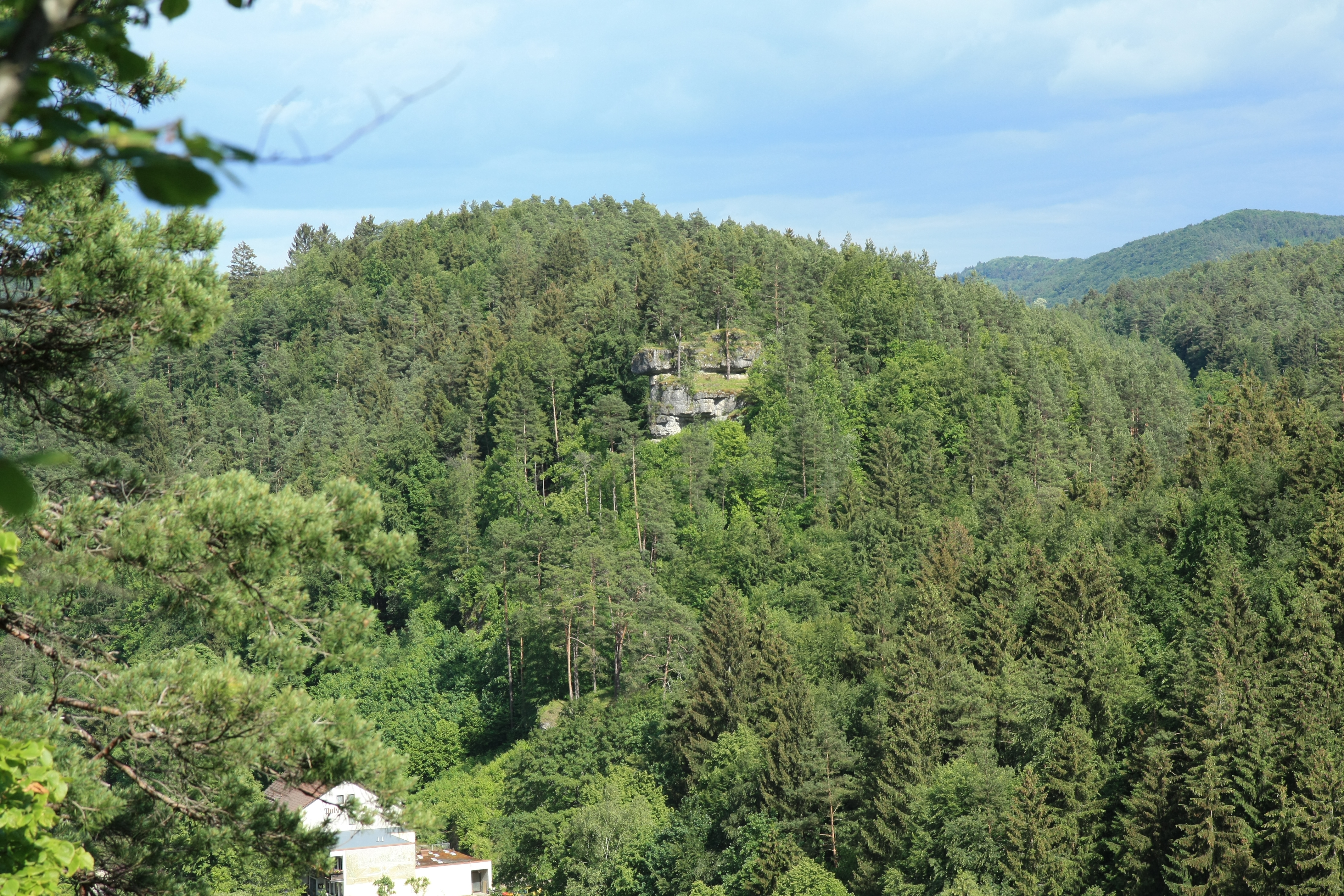 Der Burgstall Schlüsselberg über der Pulvermühle